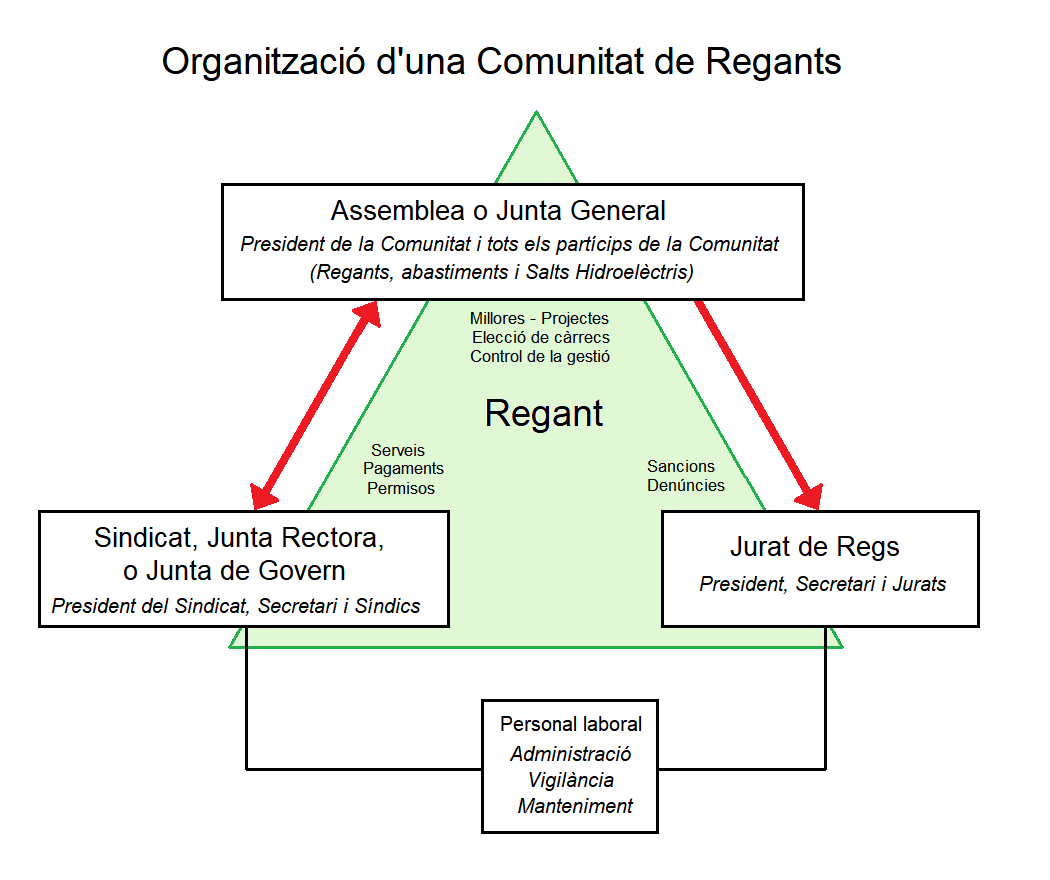 Organitzacio dels órgans d'una comunitat de Regants